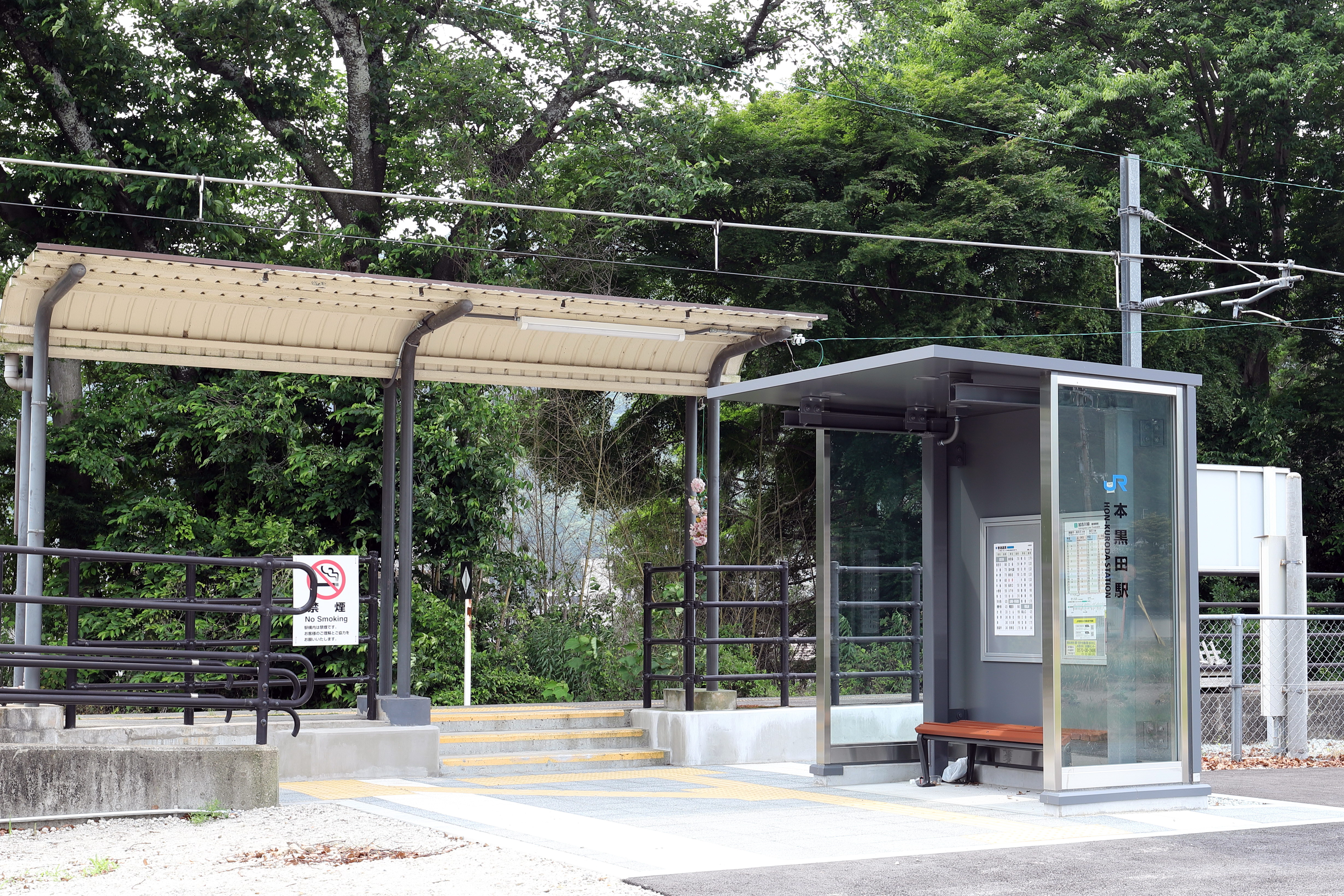 本黒田駅 2020年 改築後の駅舎 Canon EOS 6D Mark II